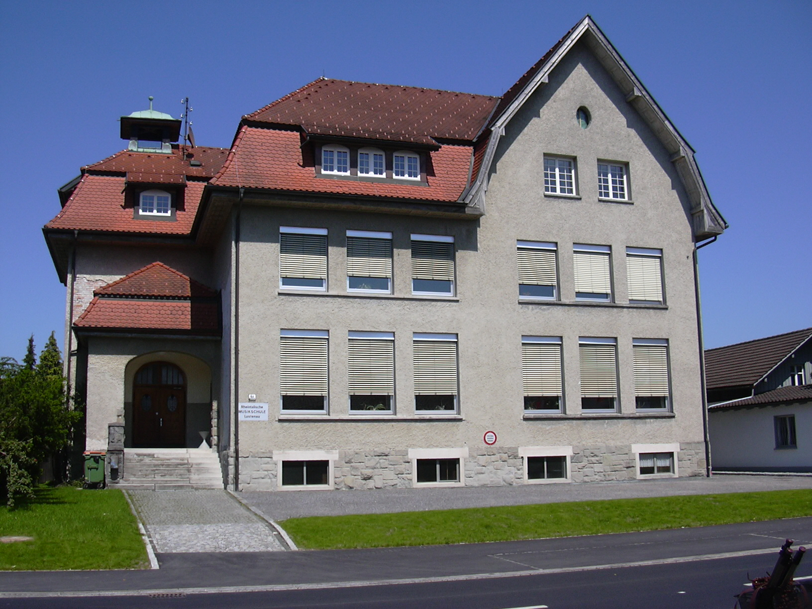 Rheintalische Musikschule Lustenau